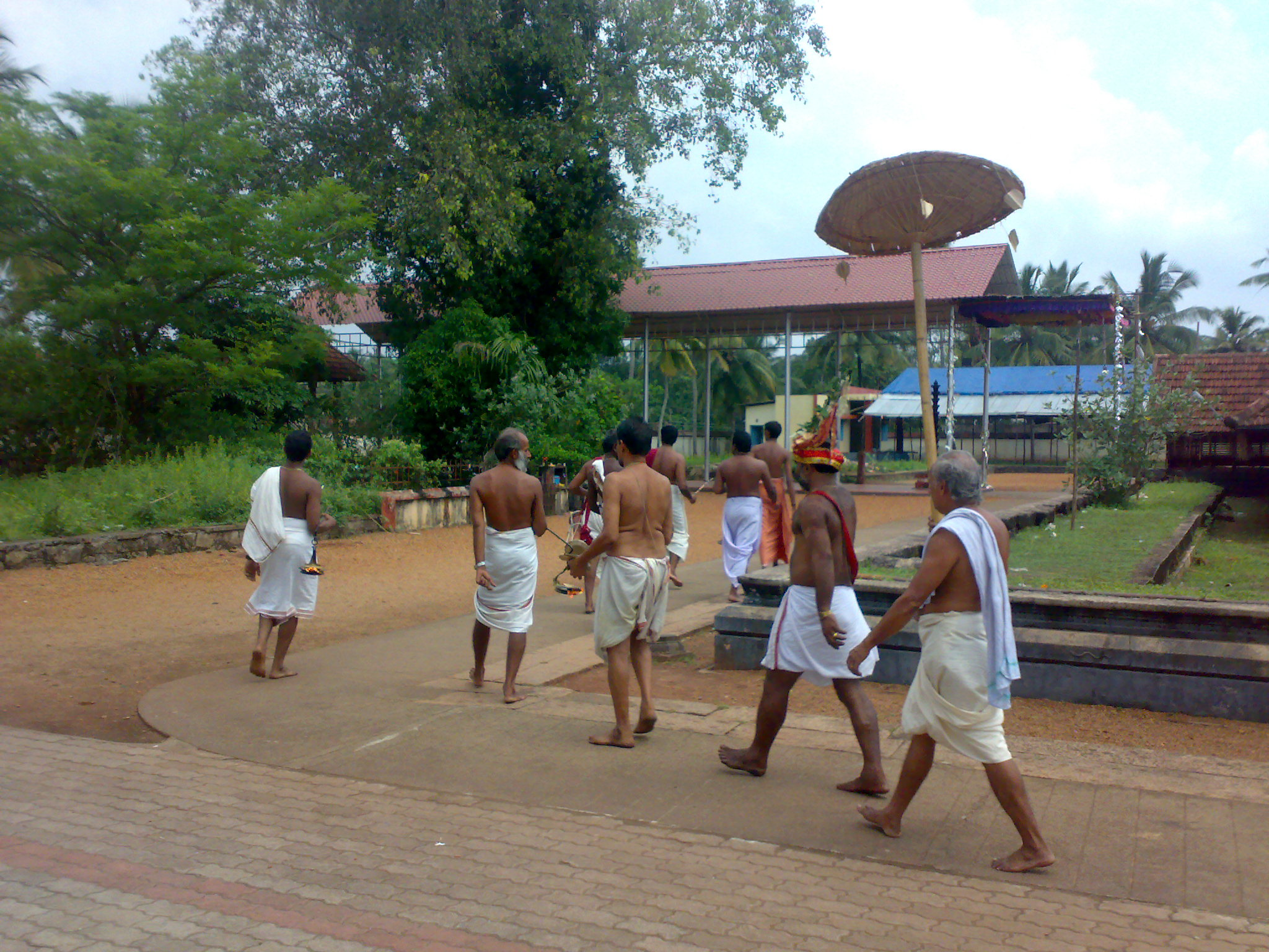 വാഴപ്പള്ളിക്ഷേത്രം ശീവേലി എഴുന്നള്ളിപ്പ്‍ കന്നിമൂല ശാസ്താവിന്റെ നടയ്ക്കരികിൽ